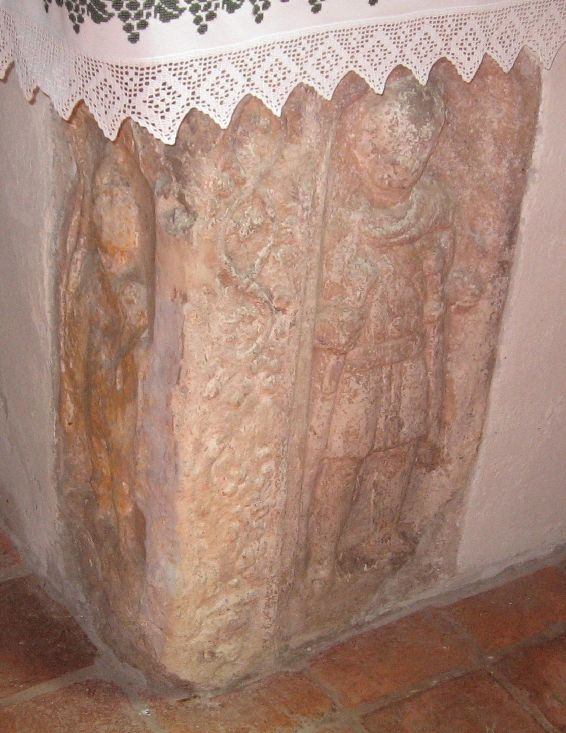 Roman Relief inside Saint George church on Danielsberg.